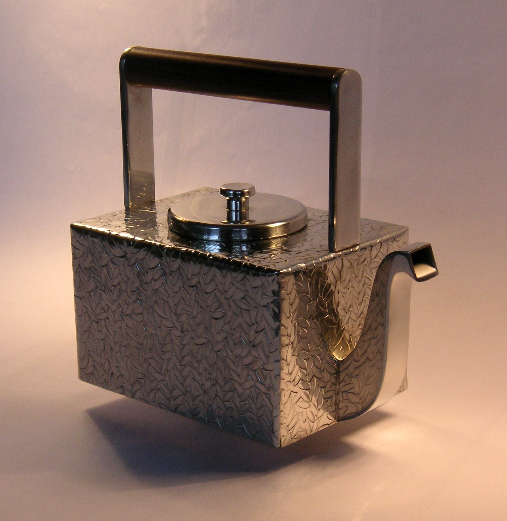 Signe Persson-Melins tekanna i tenn